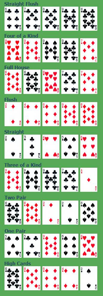 Poker Hands